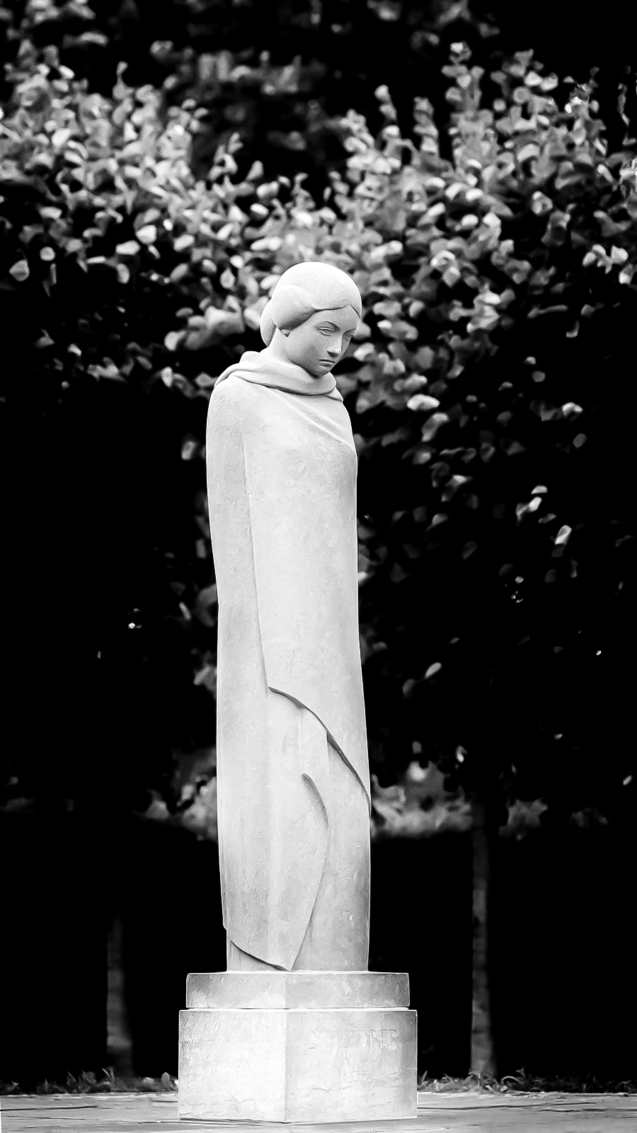 Oorlogsmonument bij de St. Bavo Basiliek, te Haarlem